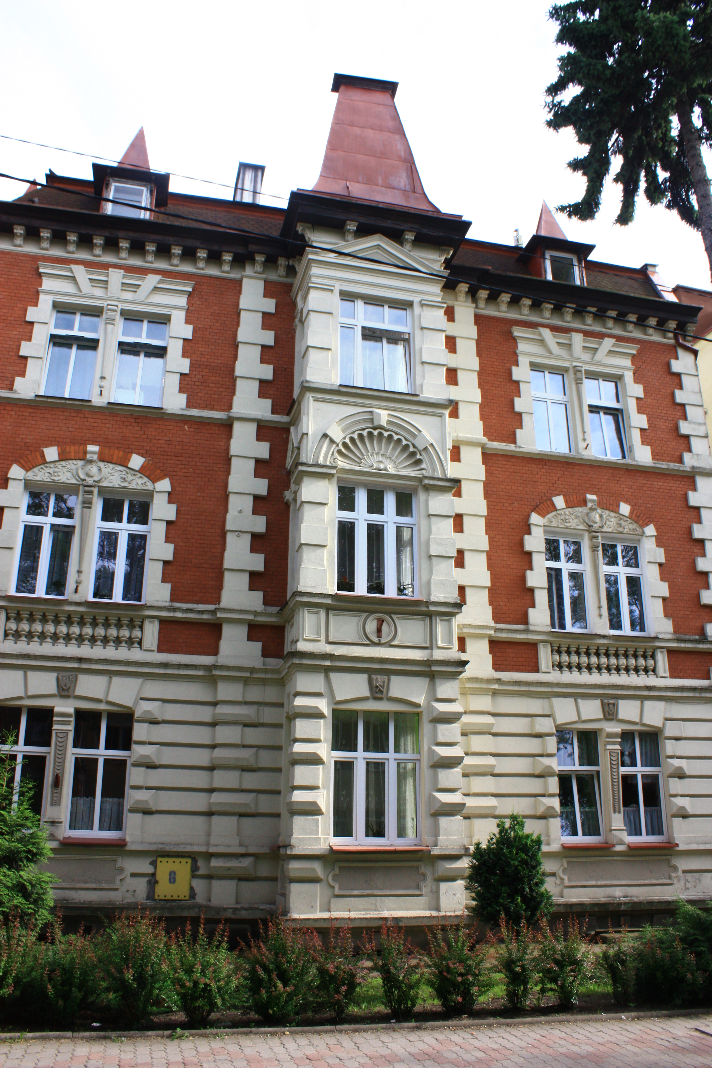 Ostróda, dom, pocz. XX